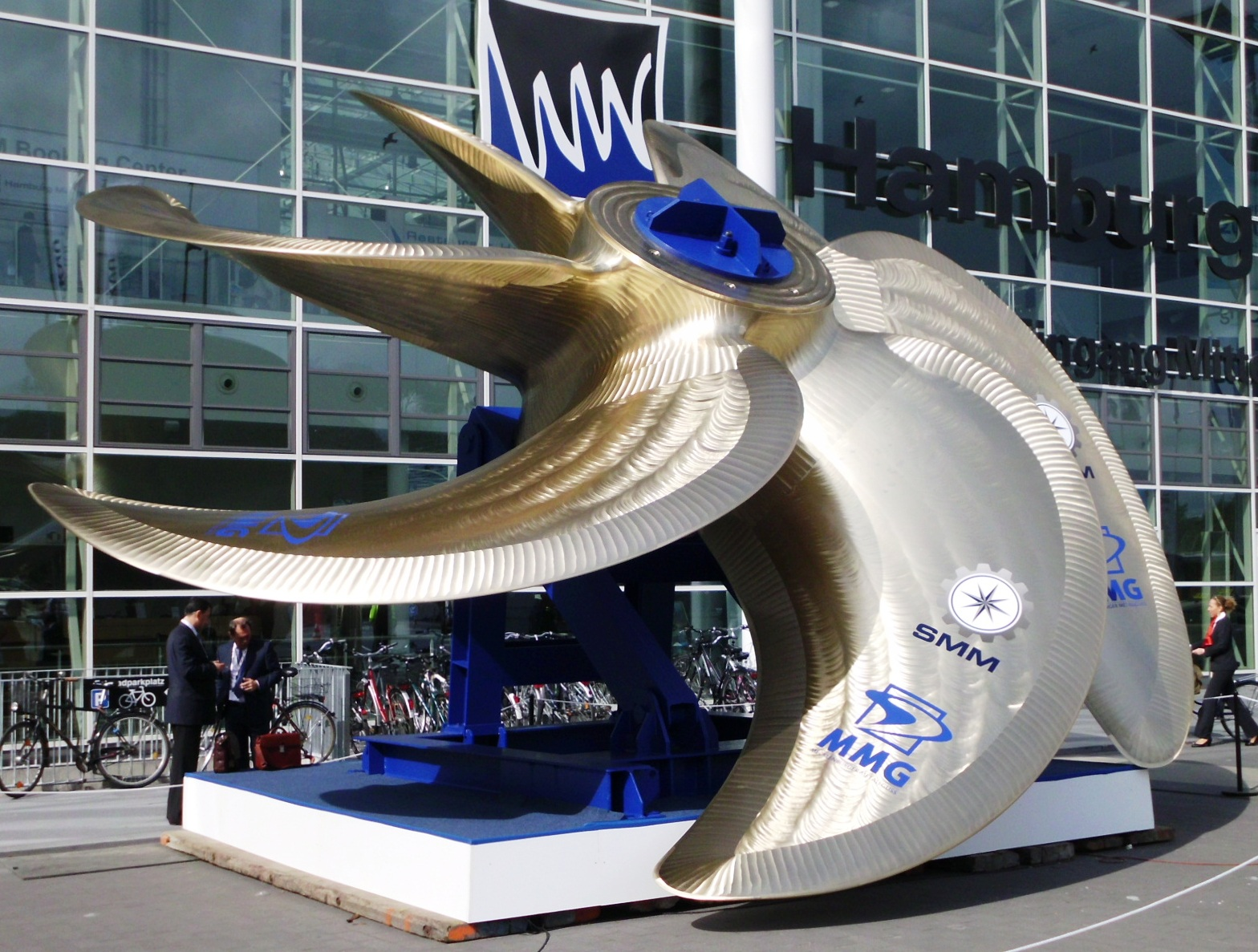 Großer 90 Tonnen schwerer Propeller der Mecklenburger Metallguss (MMG) für ein großes Containerschiff